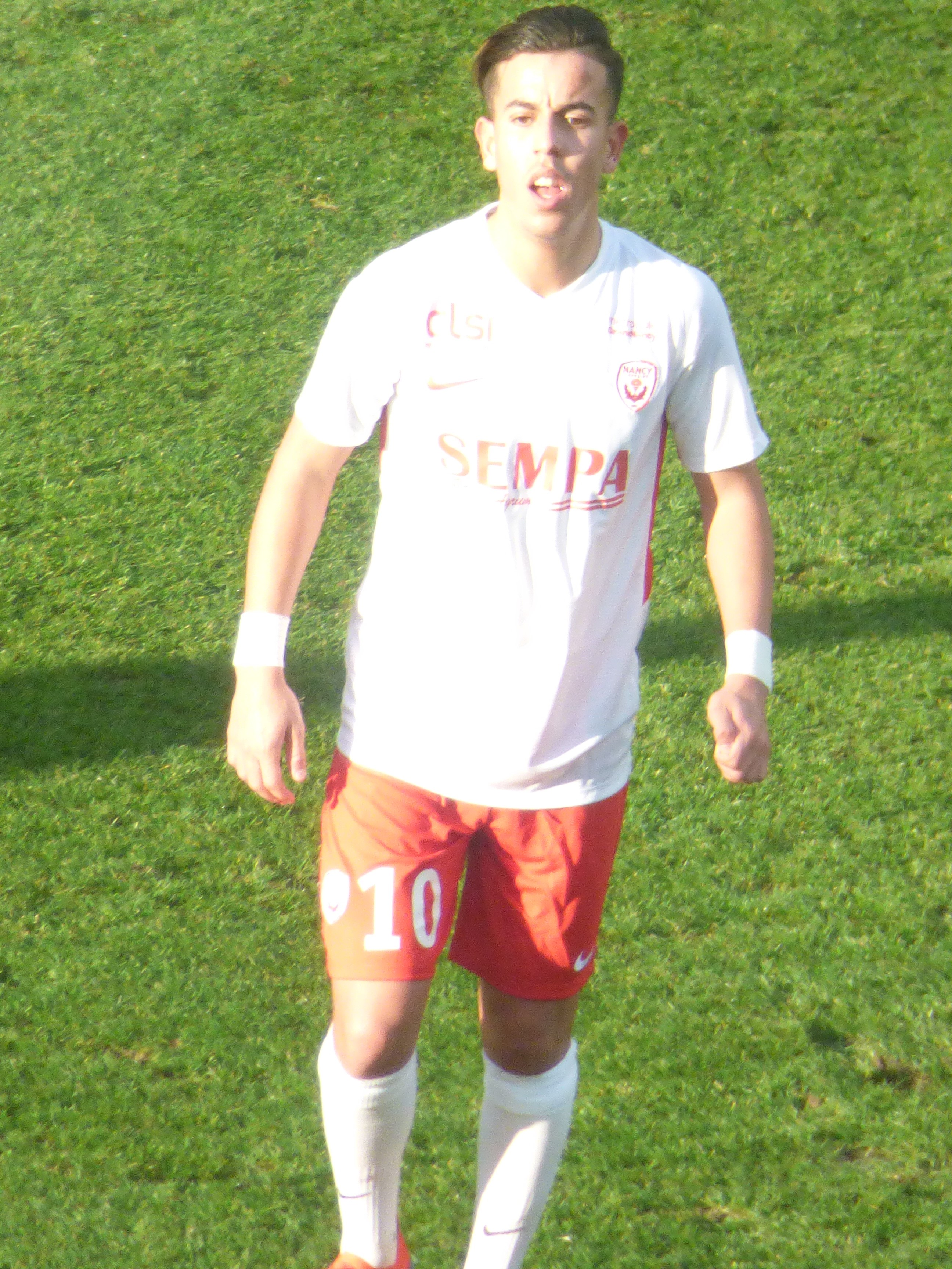 Amine Bassi lors du match RC Lens / AS Nancy-Lorraine, comptant pour la vingt-et-unième journée du championnat de France de football de Ligue 2 2018-2019, le 19 janvier 2019, au Stade Bollaert-Delelis de Lens.